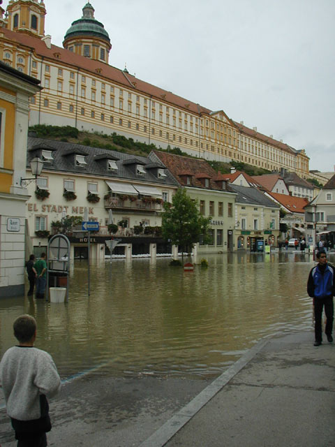 Der Hauptplatz von Melk wurde durch die Donau bis zu drei Meter unter Wasser gesetzt. Im Hintergrund das Stift Melk.